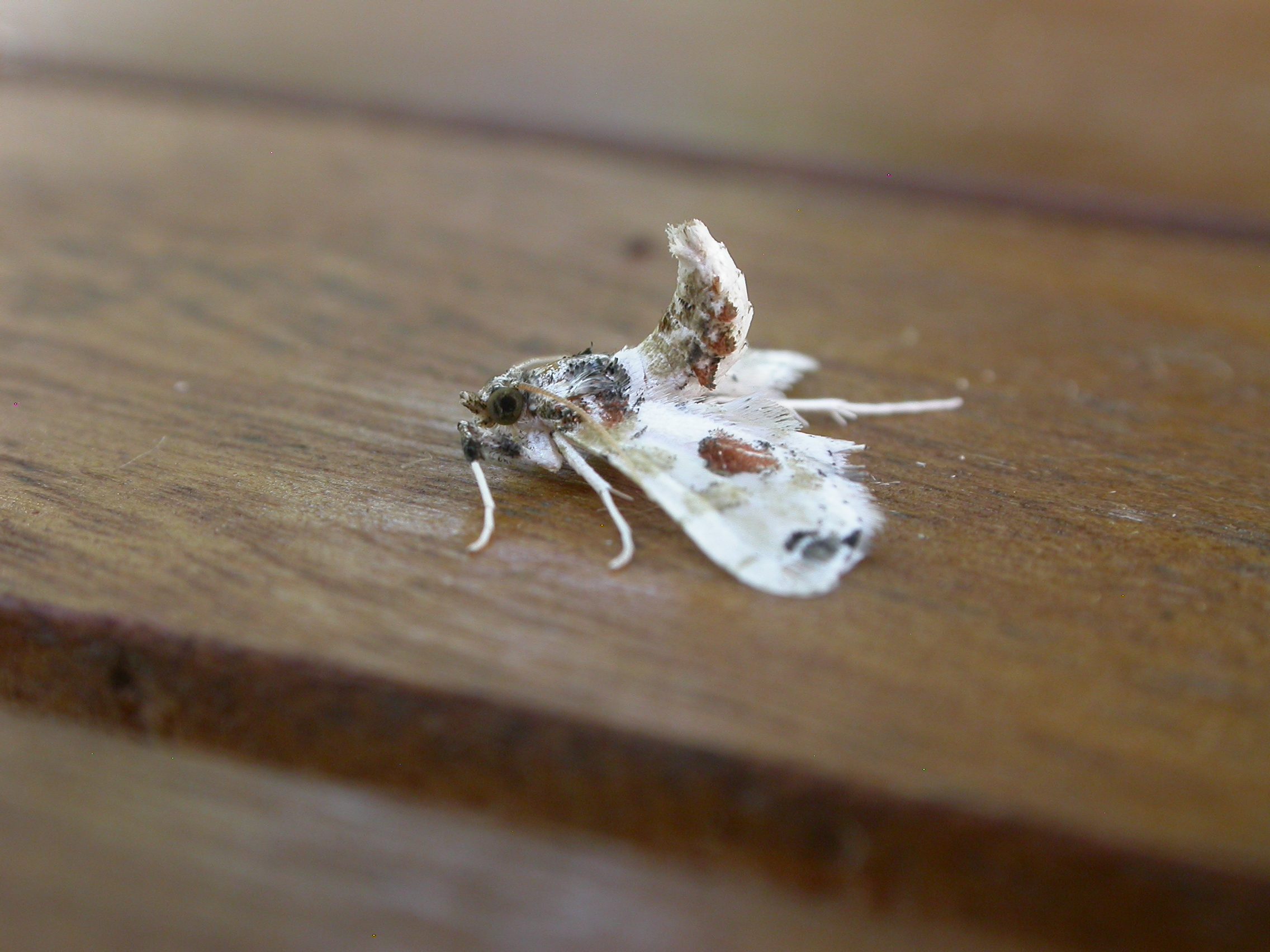 Leucinodes orbonalis Guenée, 1854, Mission Beach, QLD, 21 December 2011